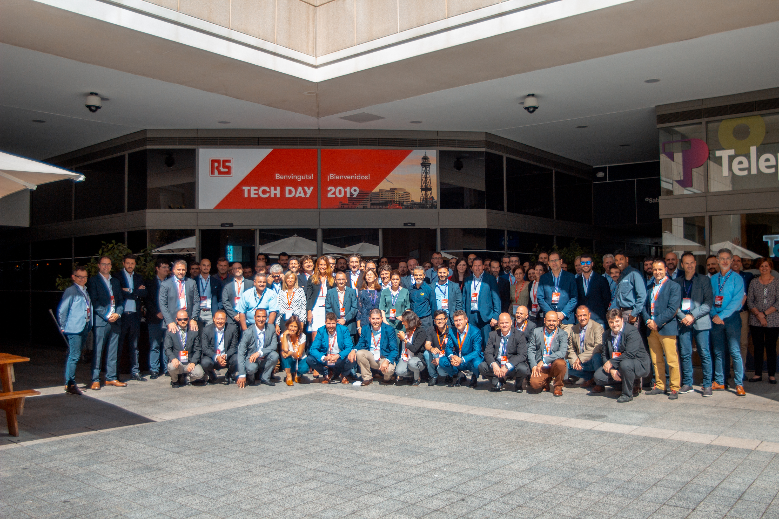 El equipo de RS Components Iberia posa con orgullo al final del Tech Day organizado en Barcelona.